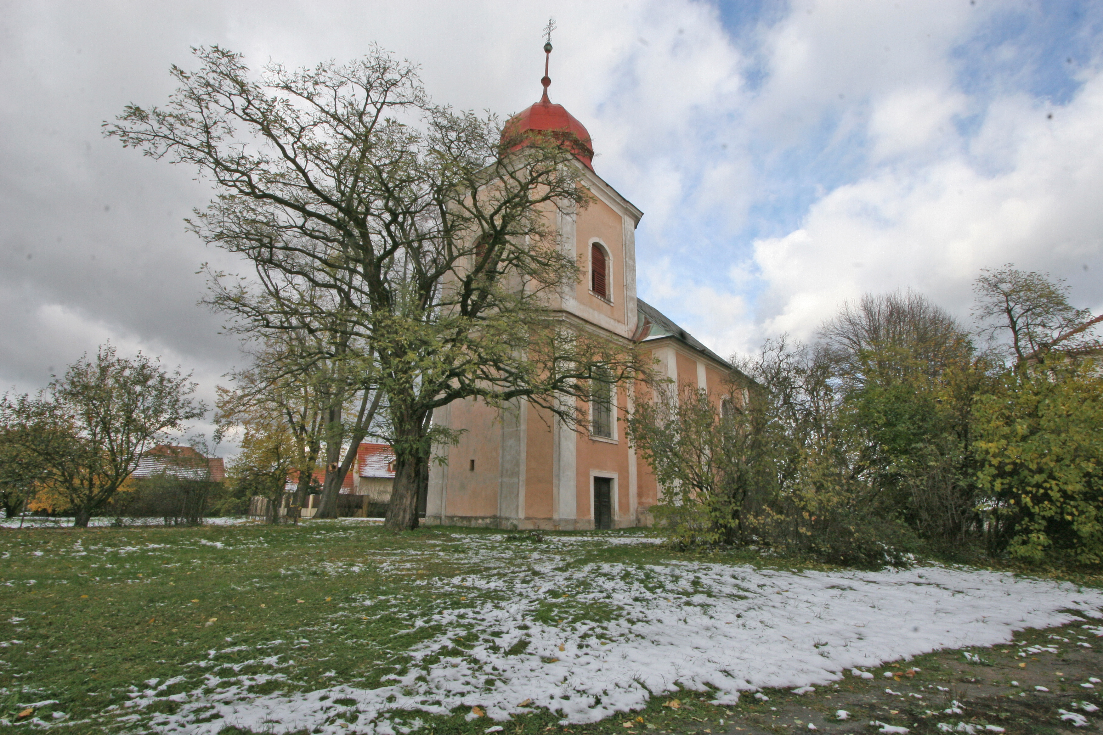 Kostel sv. Petra a Pavla (Rohovládova Bělá), Rohovládova Bělá